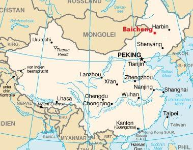 Lage der Stadt Baicheng Als Bild wurde von Bild:Changchun Lage.jpg genommen und der Punkt versetzt.